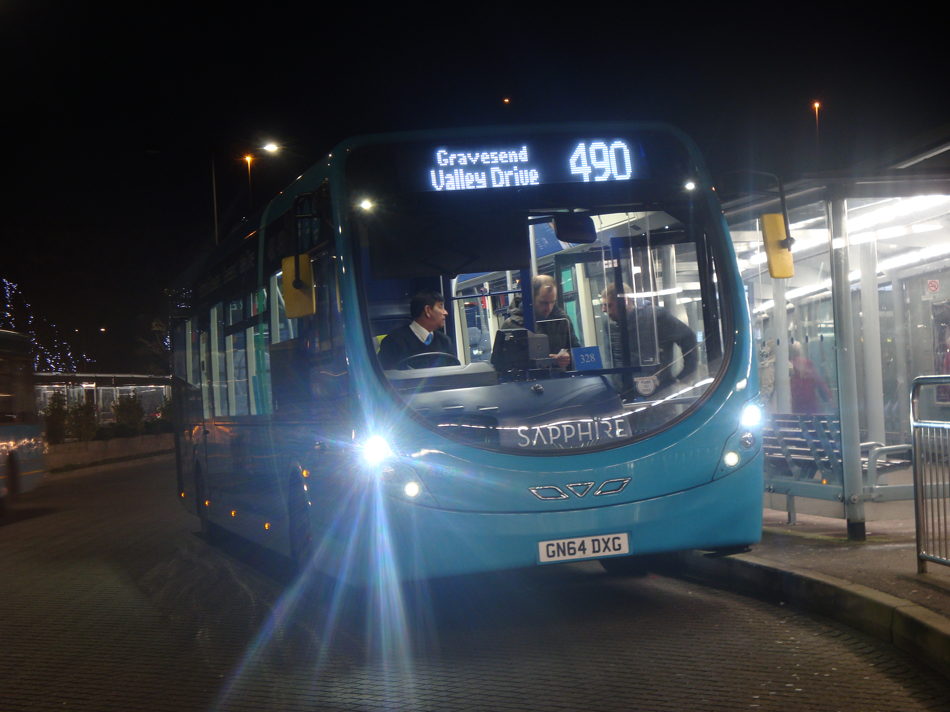 GN64 DXG